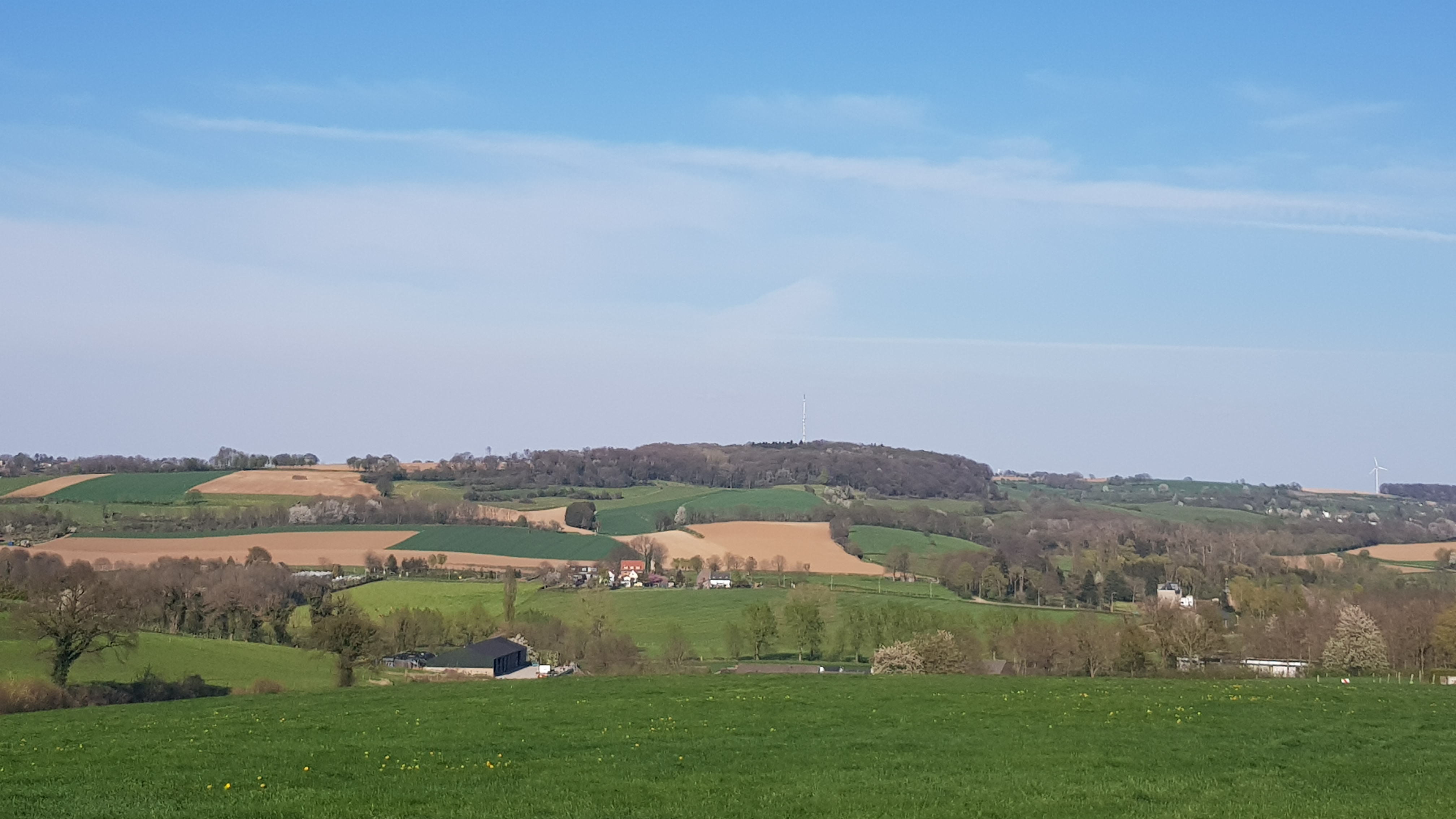 Eyserbos op de Eyserberg, Eys, Nederland